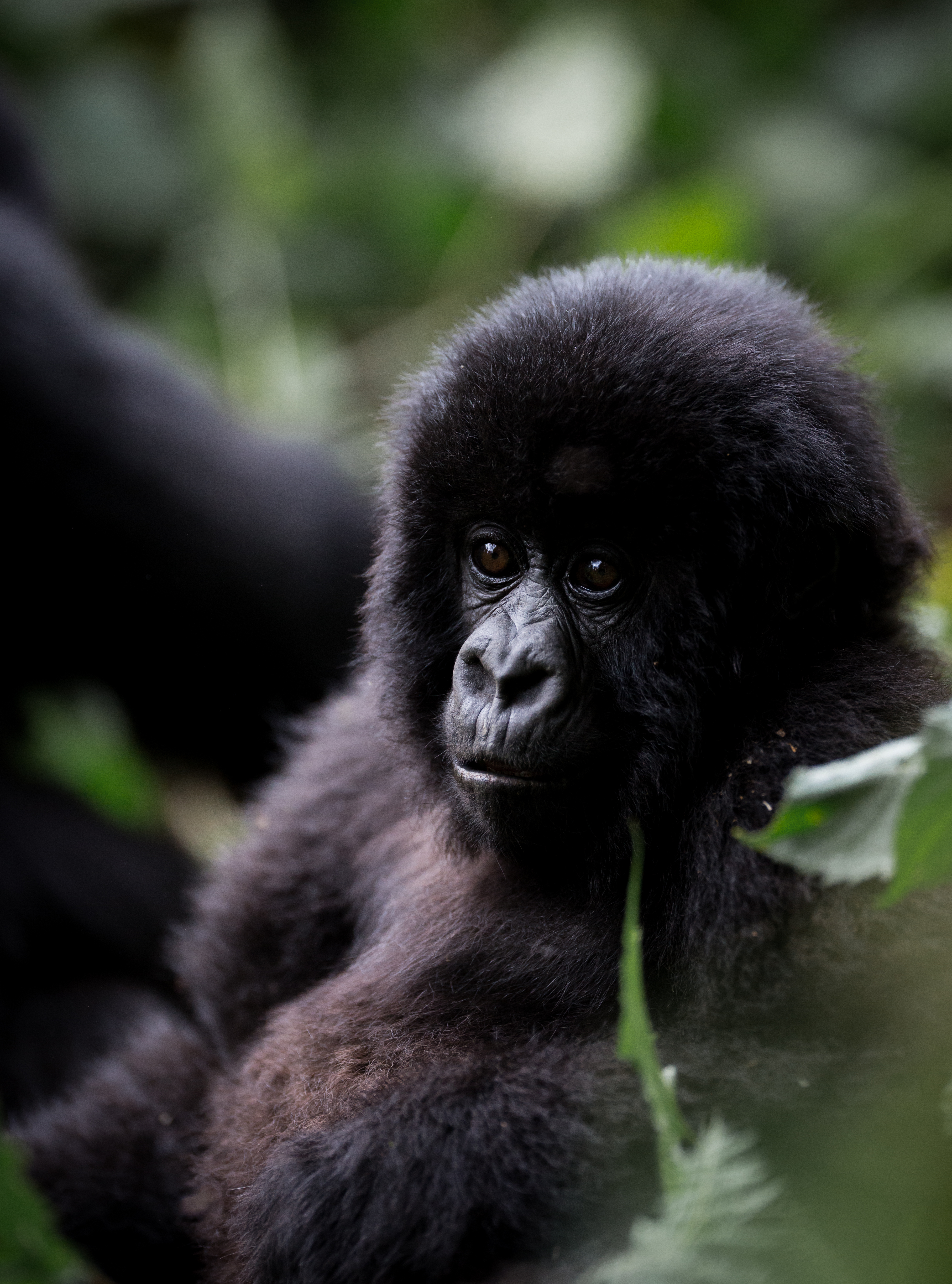 Bébé gorille des montagnes au rwanda